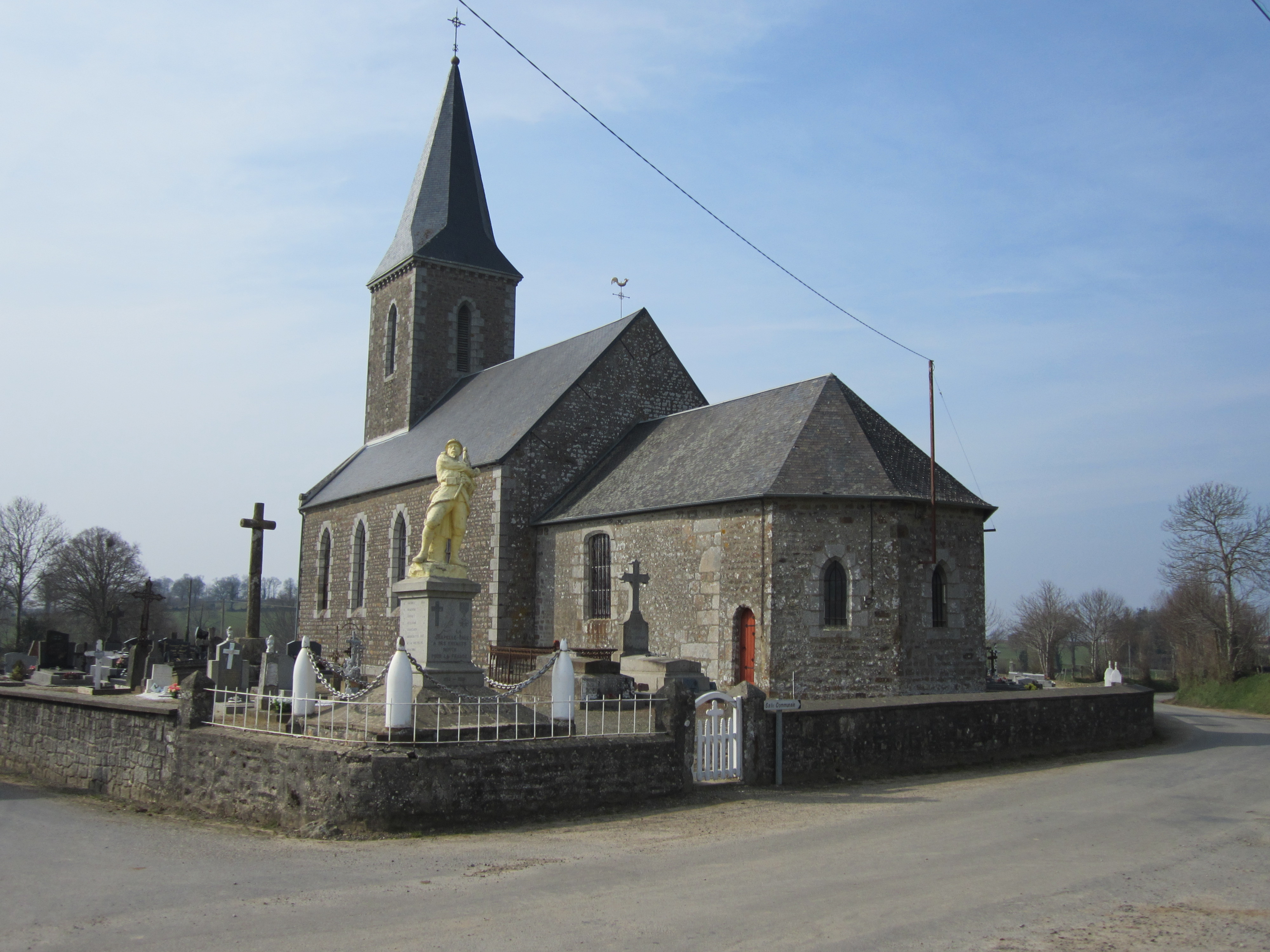 Église Notre-Dame (17e/19e), La Chapelle-Urée